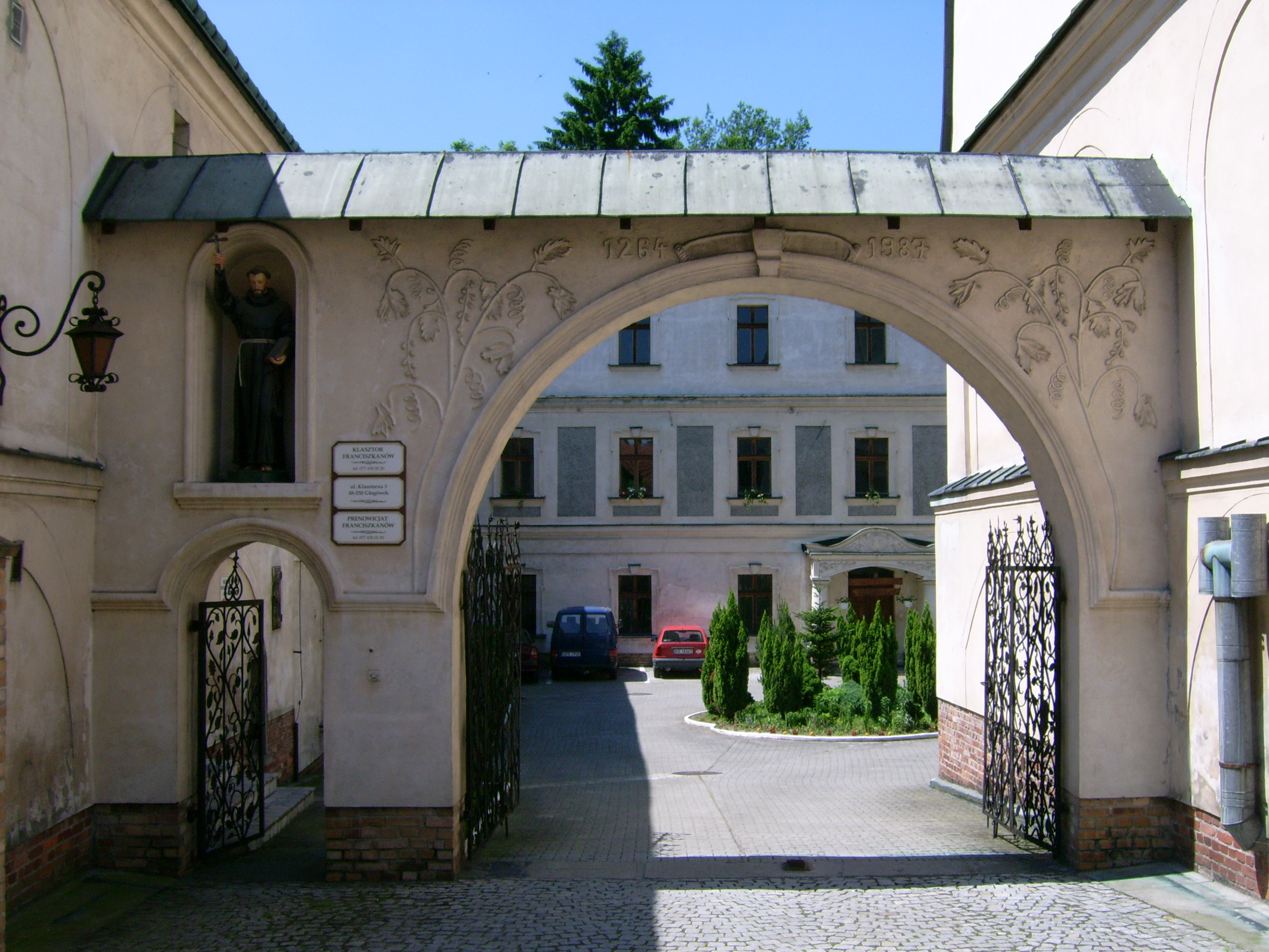 Klasztor franciszkanów. Brama. (zabytek nr rejestr. A/943/64)